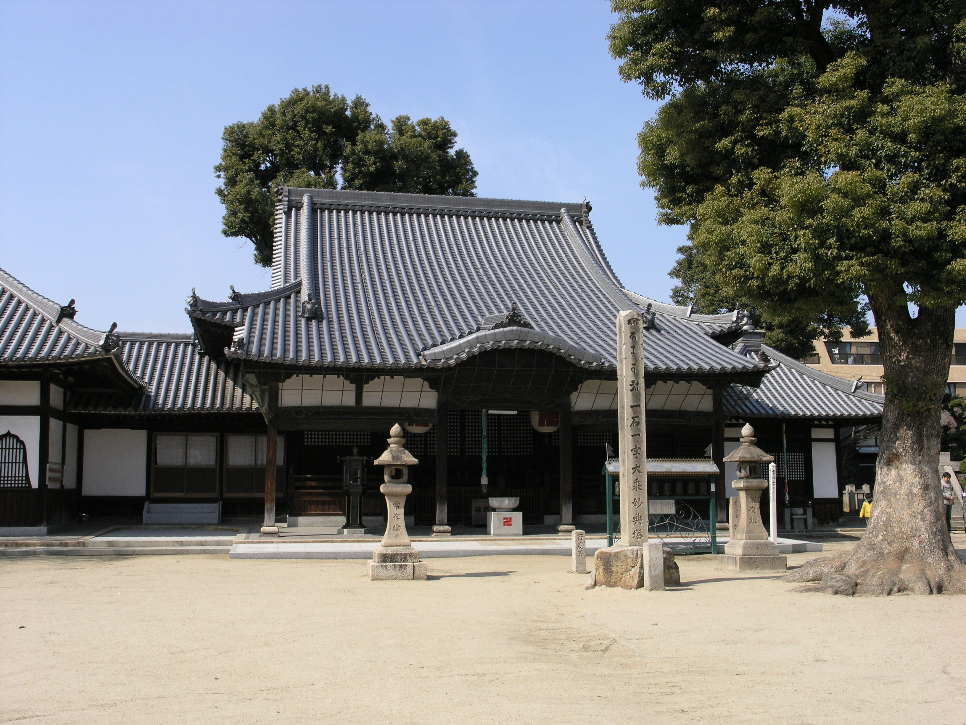 Jōkōji in Yao, Osaka, Japan